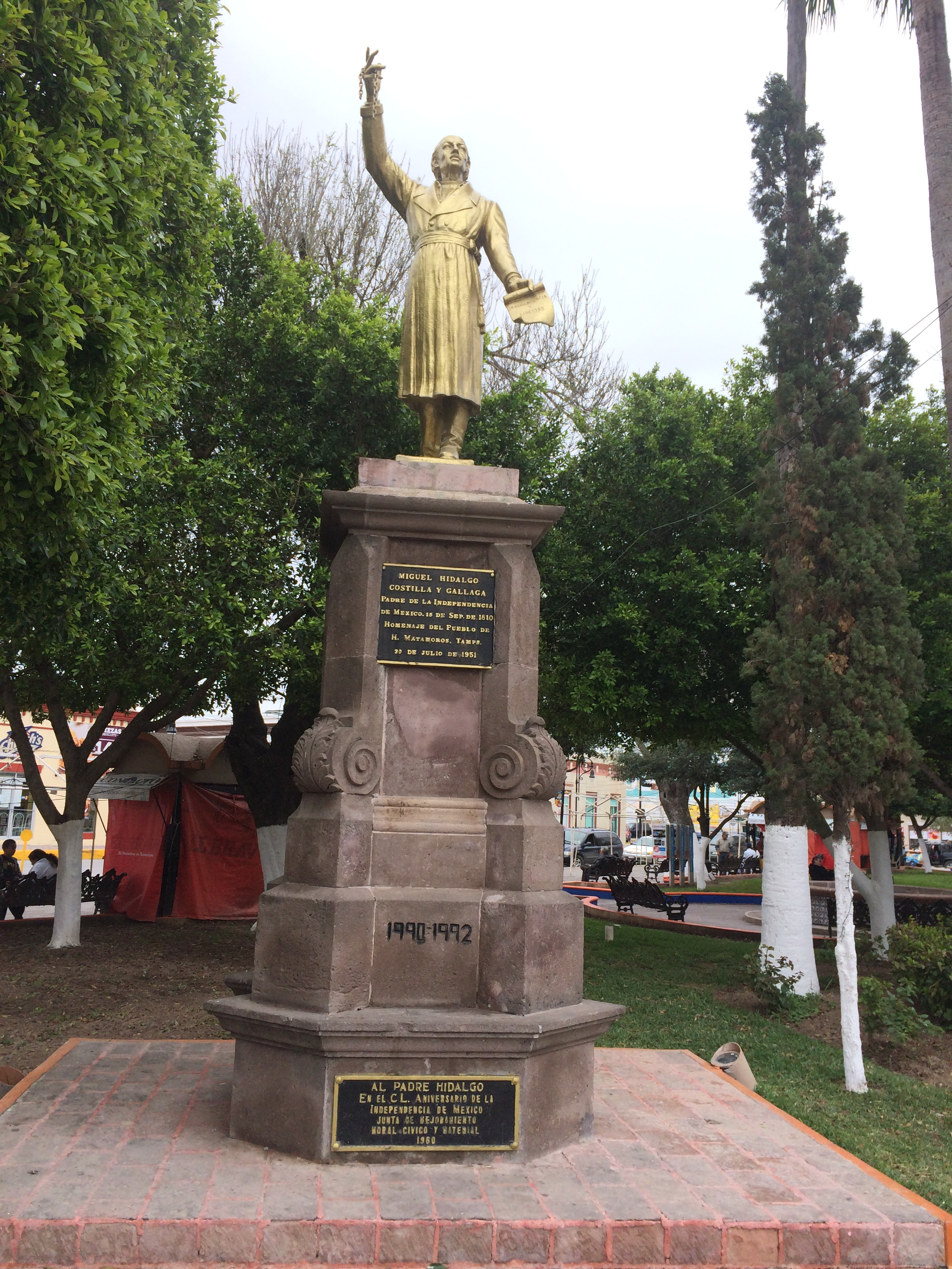 Statua di Miguel Hidalgo - Piazza principale - Matamoros